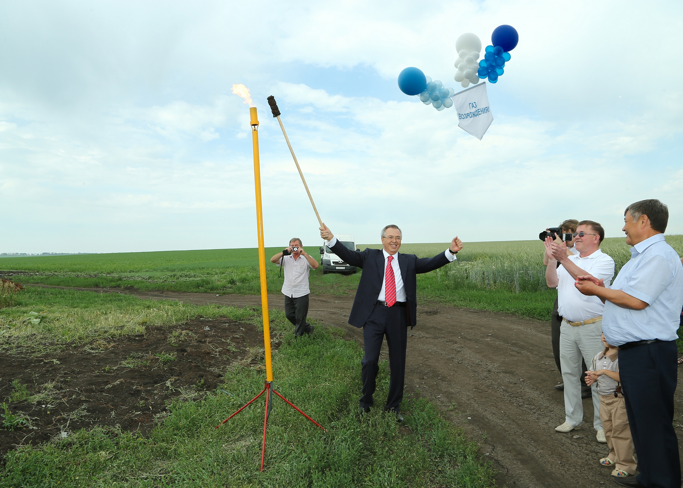 В Столяровку пришёл газ возрождения. Факел зажигает Сергей Иванов. 2013 год